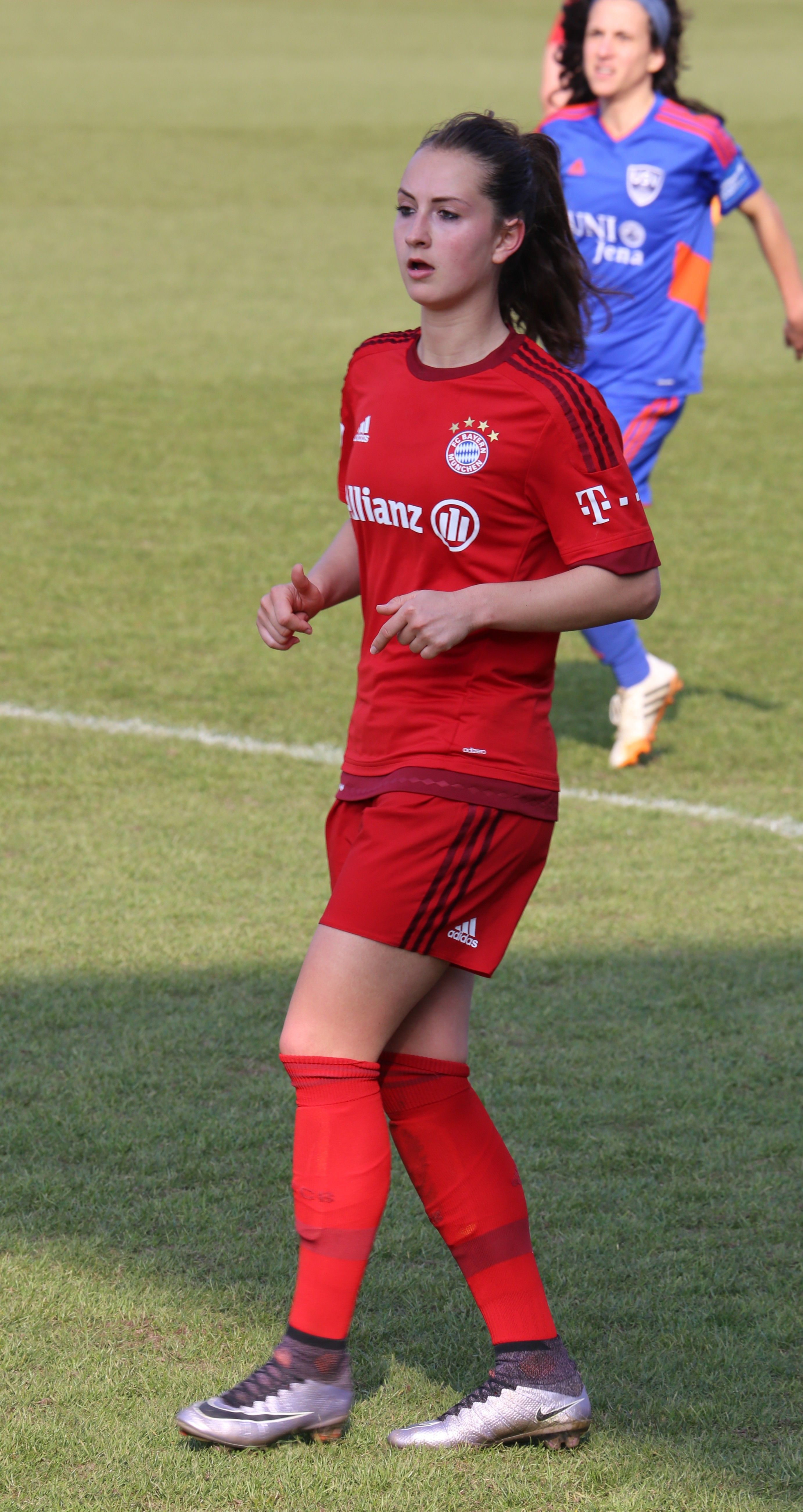 Sara Däbritz (FC Bayern München) beim Frauen-Bundesliga-Spiel FC Bayern München gegen FF USV Jena am 19. März 2016 im Stadion an der Grünwalder Straße (Ergebnis war 5:1).